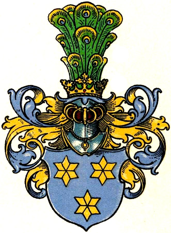 Wappen der westfälischen von von Tödwen